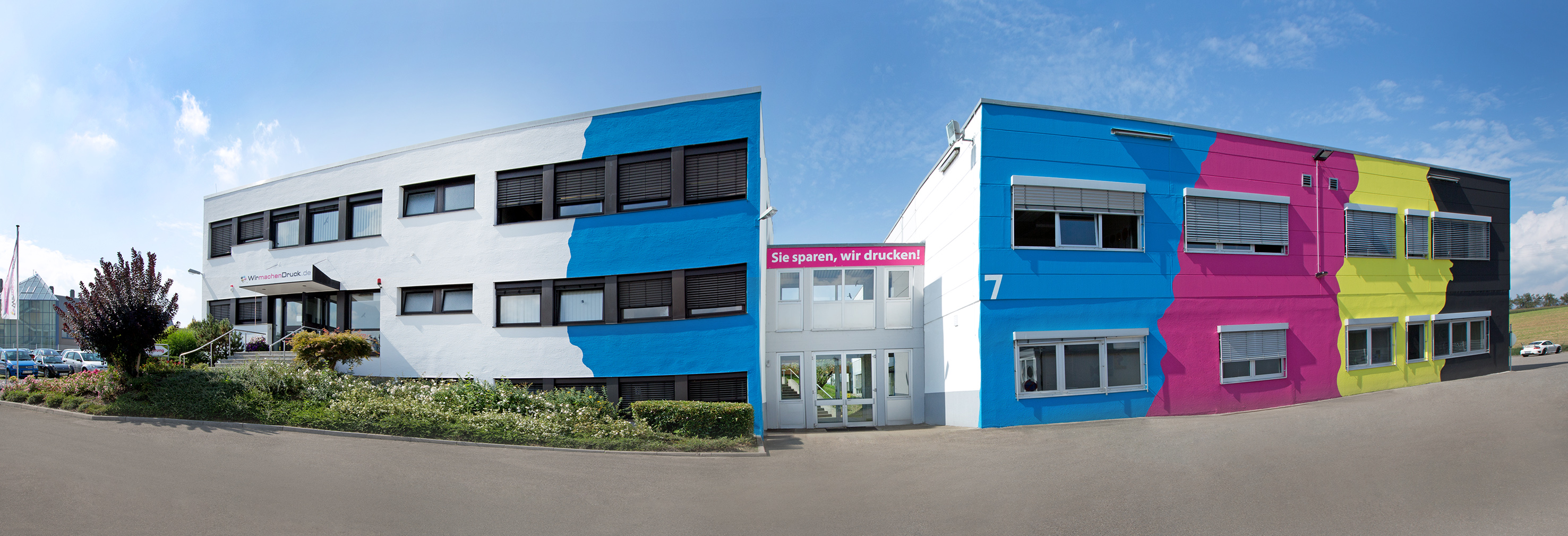 Firmengebäude der WIRmachenDRUCK GmbH